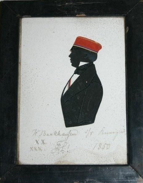 Scherenschnitt des stud. jur. Friedrich Wilhelm Barkhausen (1831-1903) aus Hannover in Couleur seines Corps Hannovera Göttingen